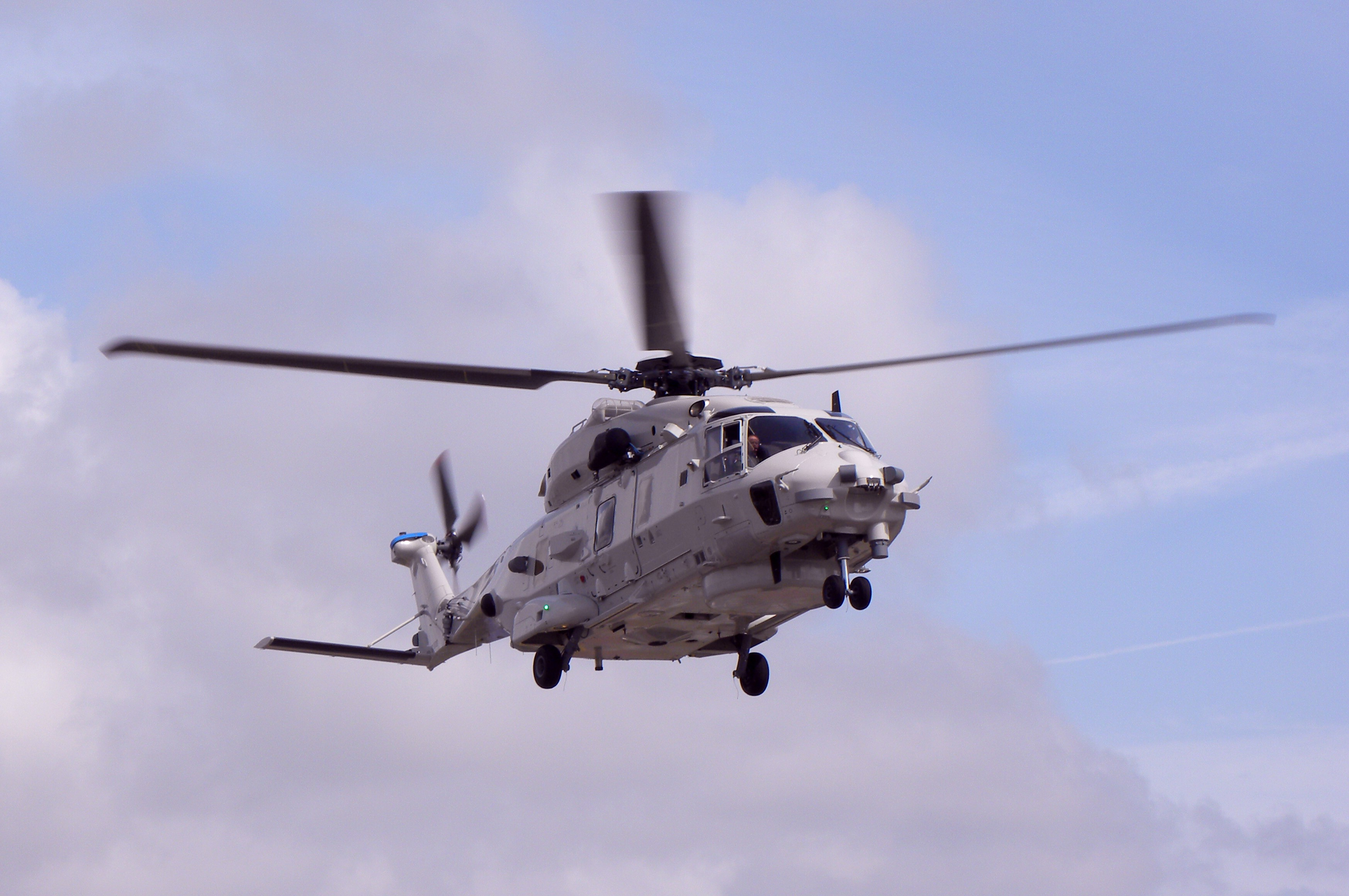 NH-90 NATO Frigate Helikopter (NFH).